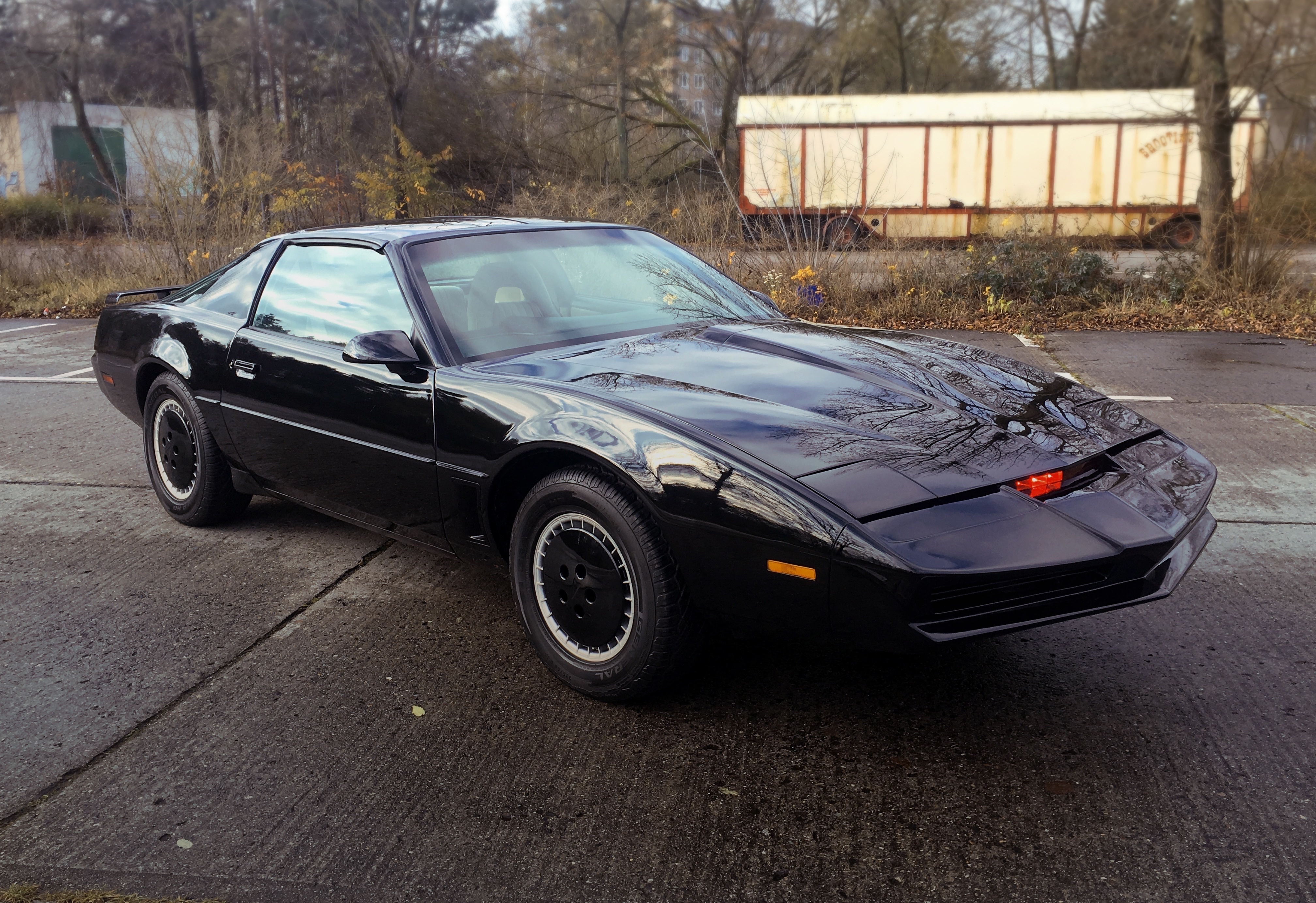 Der Nachbau von "The Knight Mission" aus Berlin begleitete David Hasselhoff 2018 auf seiner "30 Years Looking for Freedom" Tournee durch Deutschland und Österreich.